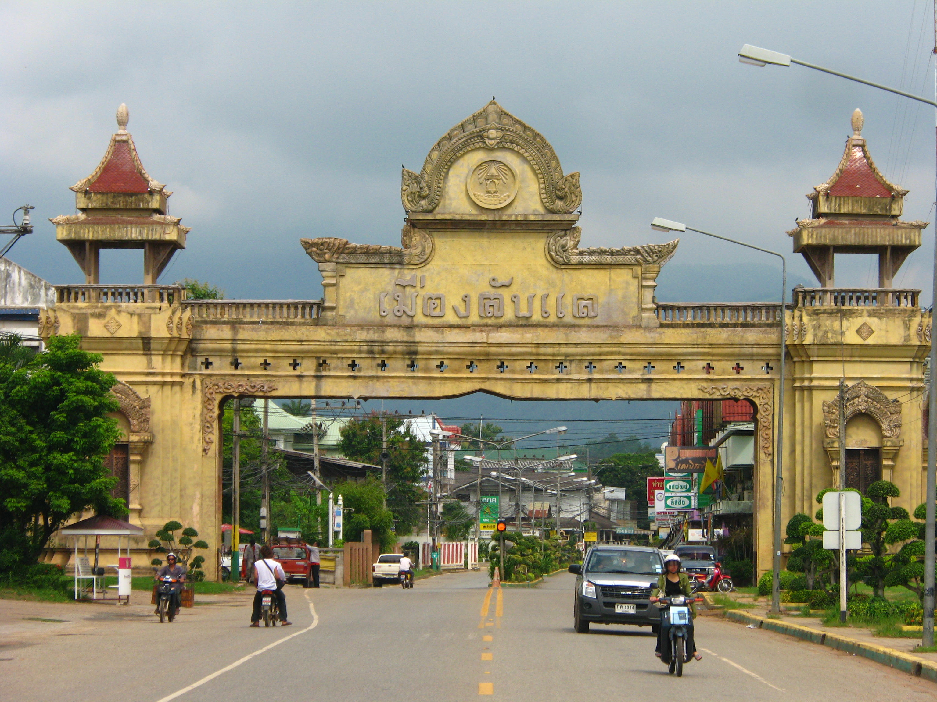 เมืองลับแล